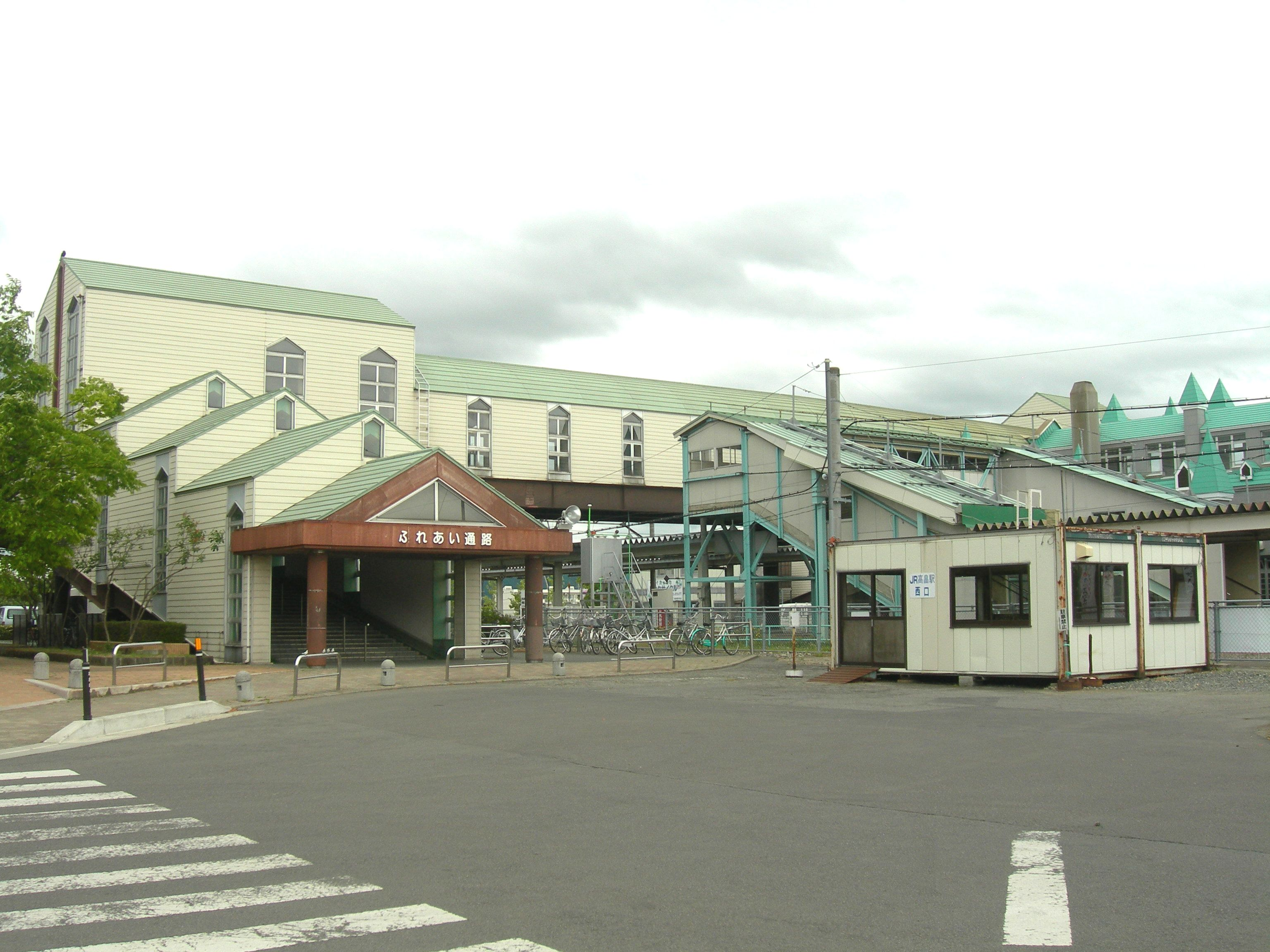 高畠駅西口駅舎と東西自由通路